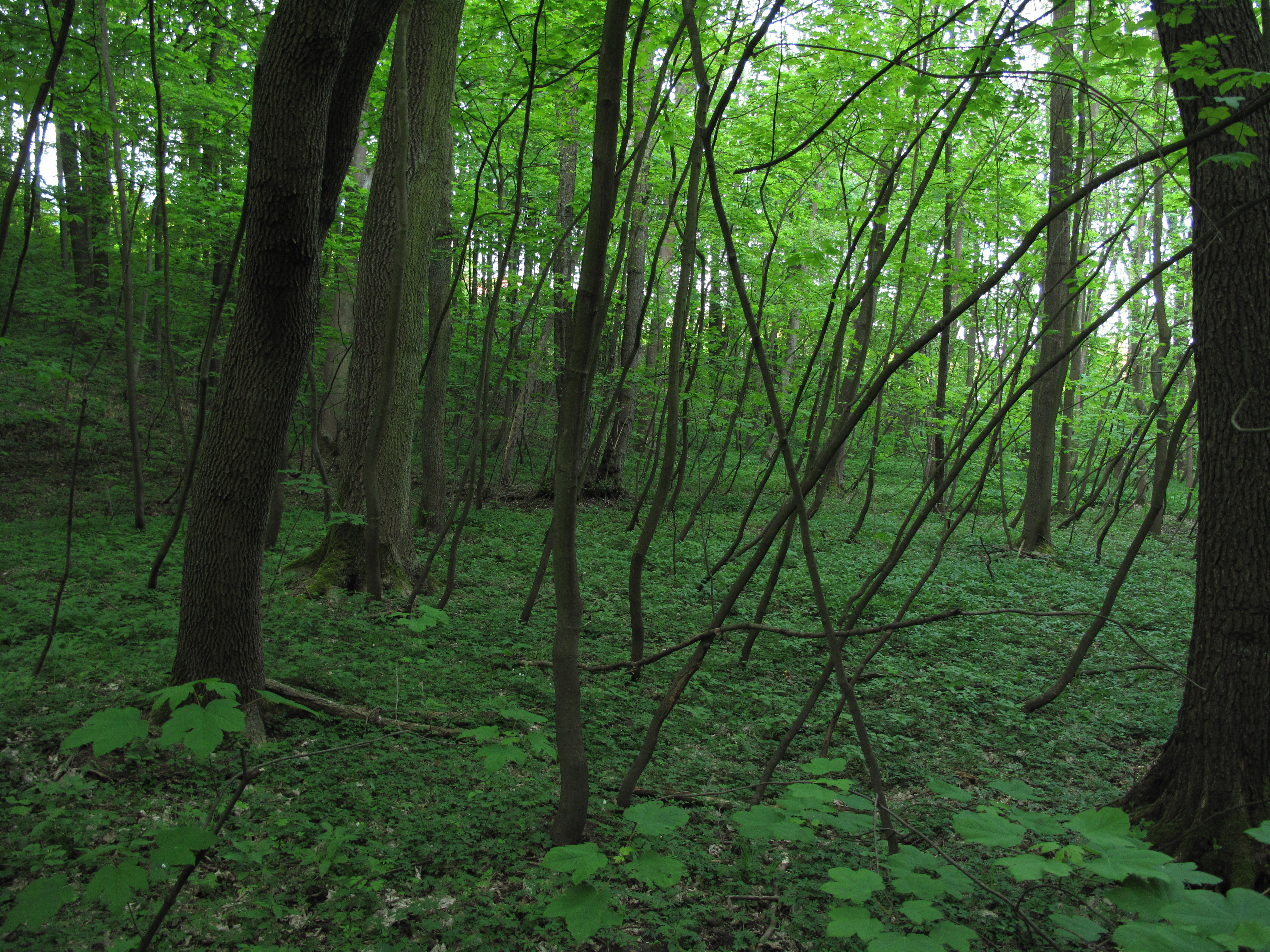 Přírodní památka Ve Šperkotně. Okres Kladno, Česká republika.